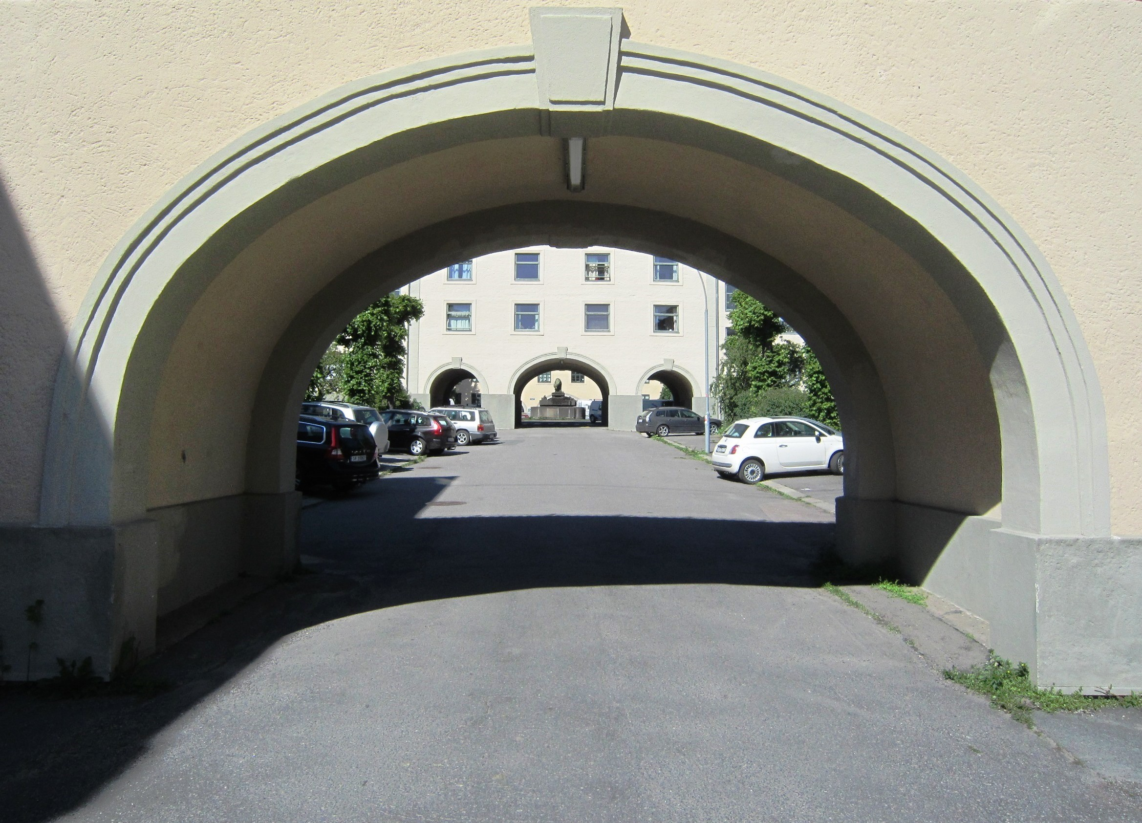 Mastrups gate på Torshov i Oslo